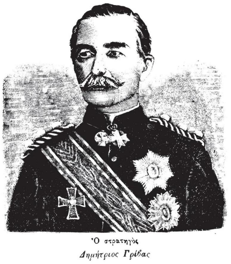 Foto eines namhaften griechischen Militärs und Politikers, 19. Jahrhundert.